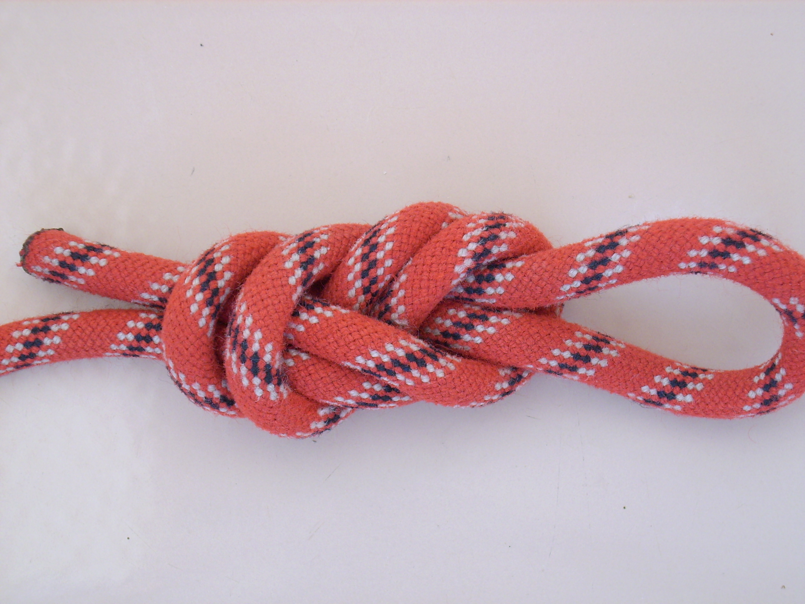 Figure-eight loop